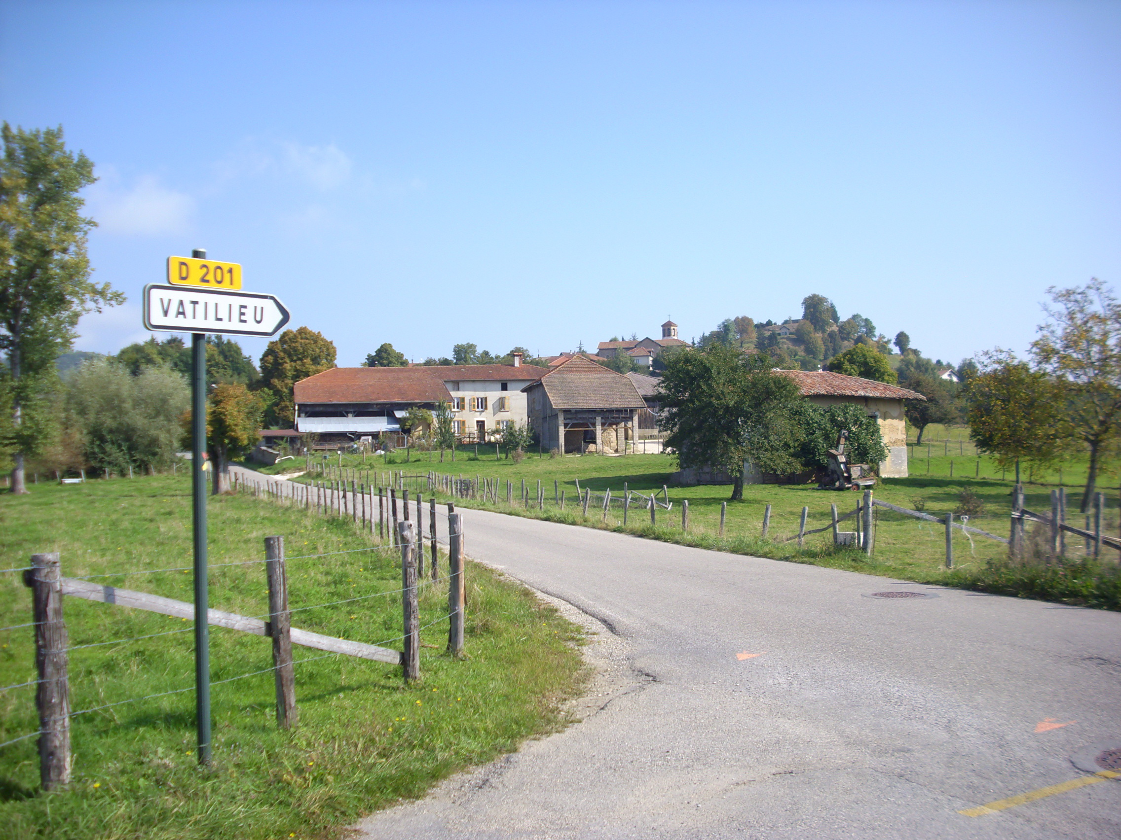 Entrée de Vatilieu et panneau directionnel